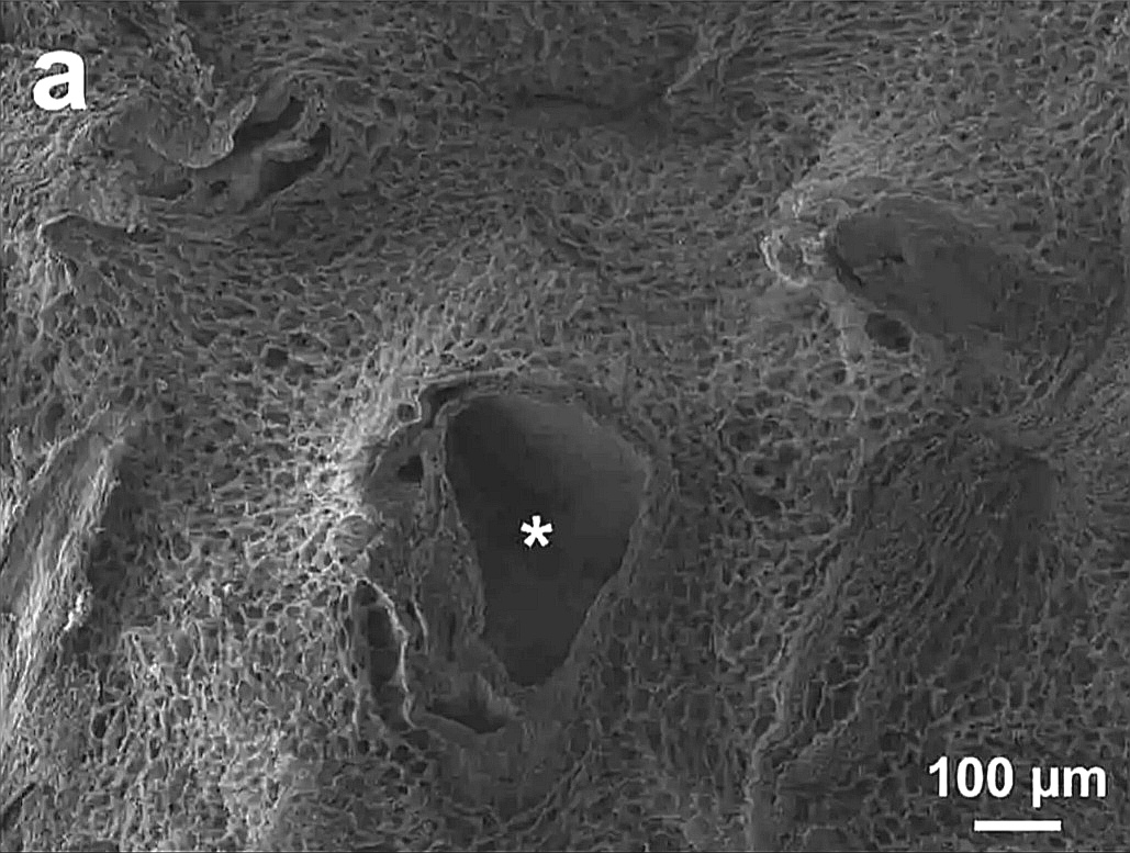 Figura 4. Caracterización ultraestructural de hígados descelularizados. (a) La imagen SEM de baja magnificación confirmó la acelularidad en los andamios, preservación de la microanatomía tridimensional del tracto portal (asterisco) rodeado por una estructura lobular típica. El espacio parenquimatoso se caracteriza por fibras de tejido conectivo dispuestas con un patrón en forma de panal, que define claramente los espacios libres de hepatocitos. Hígado humano. Imagen de microscopía SEM.